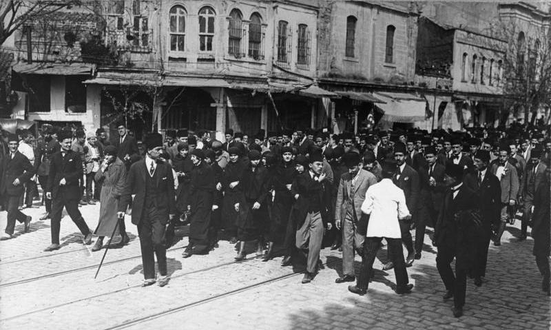 Kleinasien/Türkei, türkische Frauen bei einer Demonstration, aber nicht für Frauenrecht, sondern für die Unabhängigkeit und Freiheit ihres Vaterlandes. Aufnahme von einer politischen Demonstration des Jahres 1922, die sich gegen die Besatzungsmacht (Engländer und Franzosen) richtet. Die Frauen tragen das russische Kopftuch.